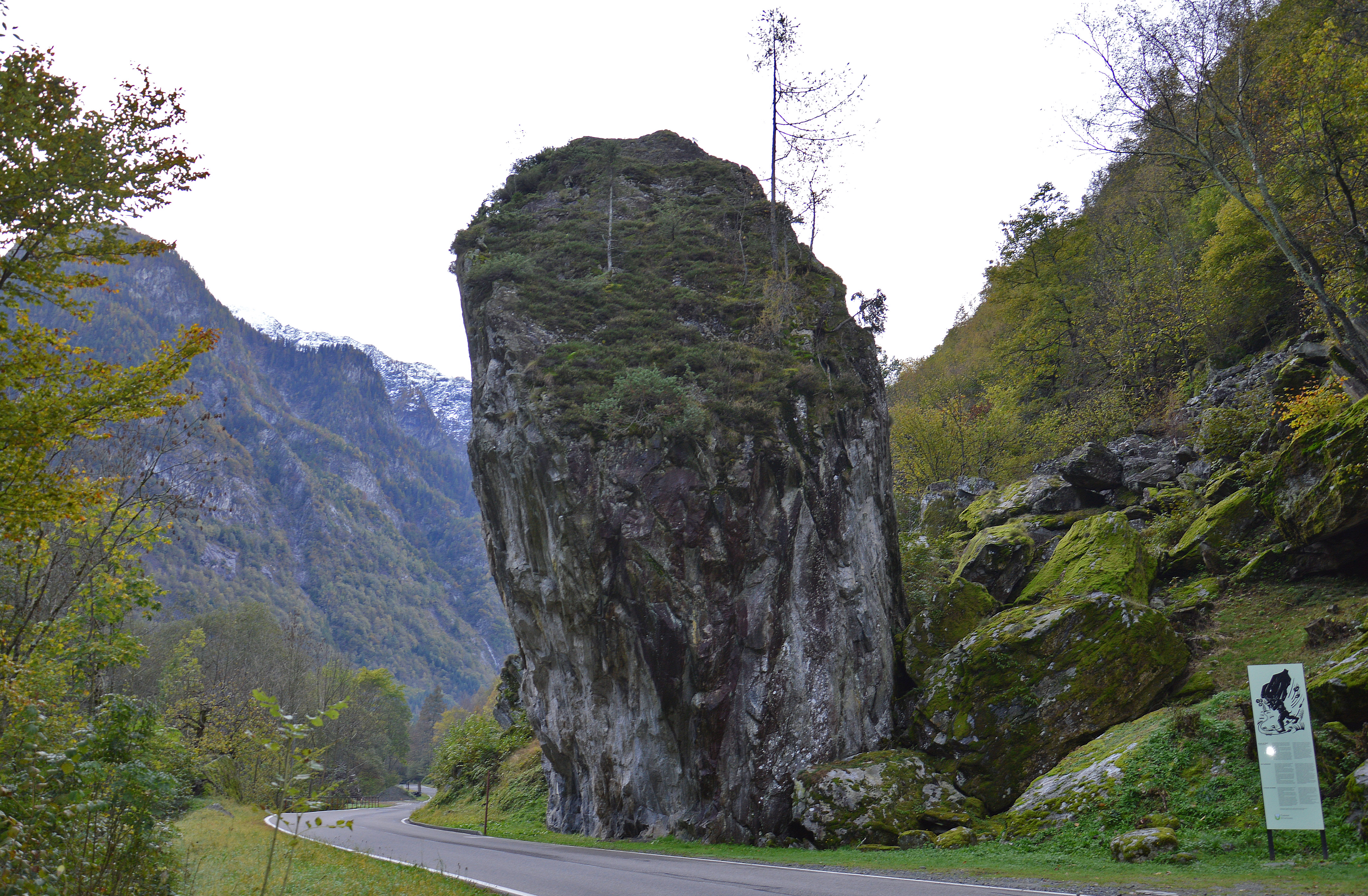 "Al sasc du diáol" Il sasso del diavolo Valle Lavizzara - Ticino Svizzera Questo enorme masso, staccatosi al ritiro dei ghiacciai dai monti di Rima e fermatosi sul fondovalle, accanto al greto del fiume, tra Broglio e Prato ha dato vita ad una leggenda che ricorda l'epico scontro tra bene e male. La leggenda, raccontata in diverse versioni, ci riporta molto lontano nei secoli, quando un villaggio della Lavizzara (Prato o Broglio), particolarmente devoto e religioso, suscitò le ire di Satana che inviò Barbariccia, uno dei diavoli più terribili e infidi, a cancellare il paese. Questo salì in montagna, strappò con furia diabolica uno spuntone di cresta, se lo mise in spalla a scese furioso a grandi passi per distruggere le case. Giunto in basso, sudato e sfinito, si imbatté in una bella e soave donna, ferma sotto a un ciliegio in fiore, che lo invitò a posare il masso e a riposare un momento. Quando poi volle riprendere il cammino, la donna - che era nient'altro che la Madonna - era scomparsa e al diavolo non fu più possibile riprendere l'enorme sasso sulle spalle per portare a compimento il suo disegno. Con rabbia e disperazione, con fuoco e fiamme che uscivano dalla bocca, e delle quali restano tuttora le tracce nere sulla roccia, si affannò furiosamente per strappare il masso dal terreno. Ogni fatica fu inutile. Alla fine, sfinito e sconsolato, non gli rimase che precipitare bestemmiando nell'inferno e rintanarsi nell'antro più profondo dell'abisso.